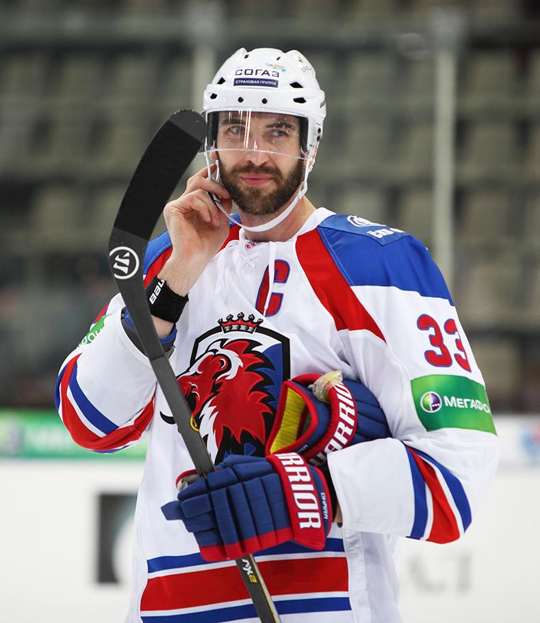 Защитник пражского «Льва» Здено Хара во время матча чемпионата КХЛ против новокузнецкого «Металлурга» 30 ноября 2012 года.